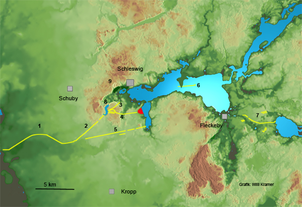 Kartierung der Danewerk-Wälle (gelbe Linien 1–9), (rot=Haithabu)